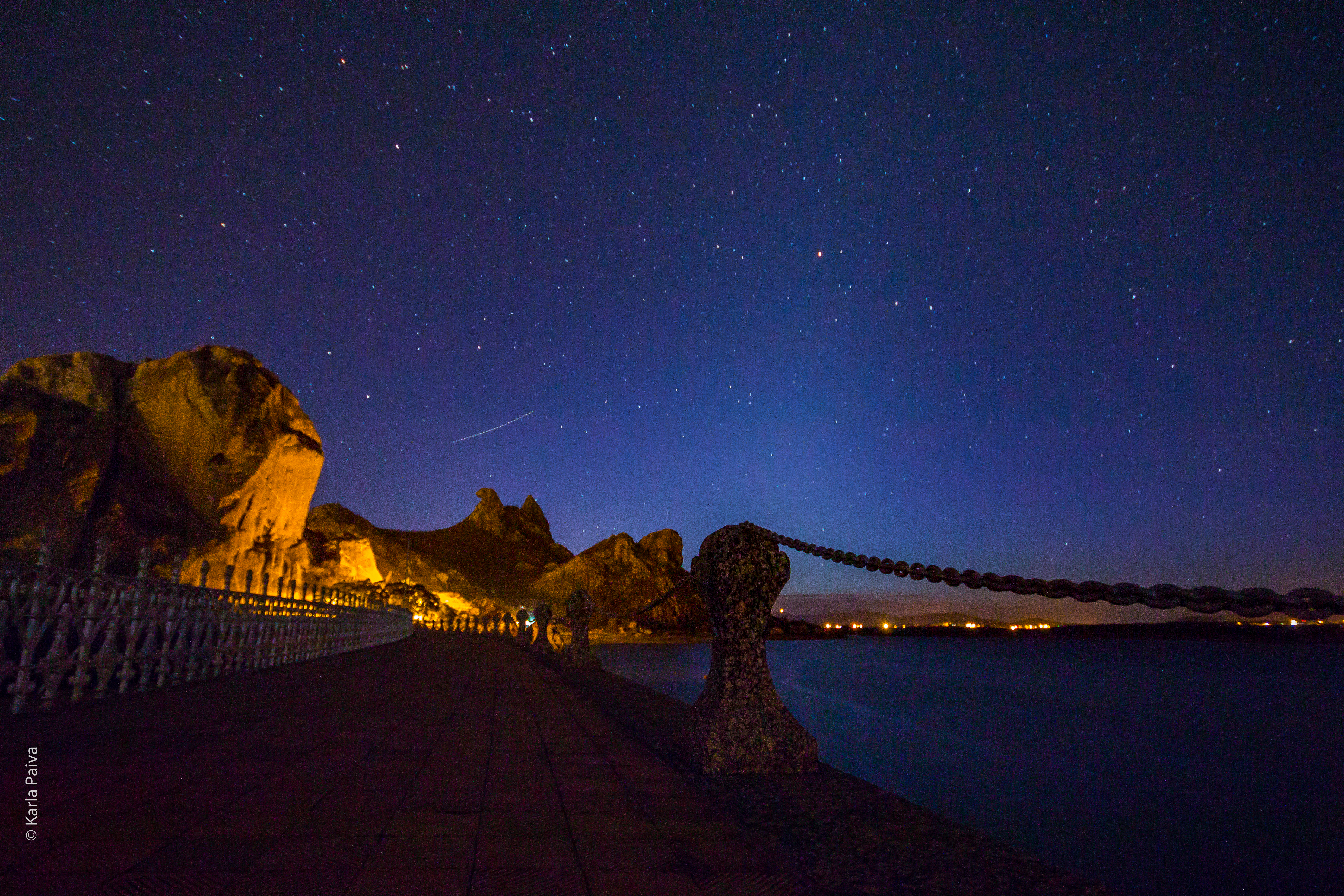 Açude do Cedro